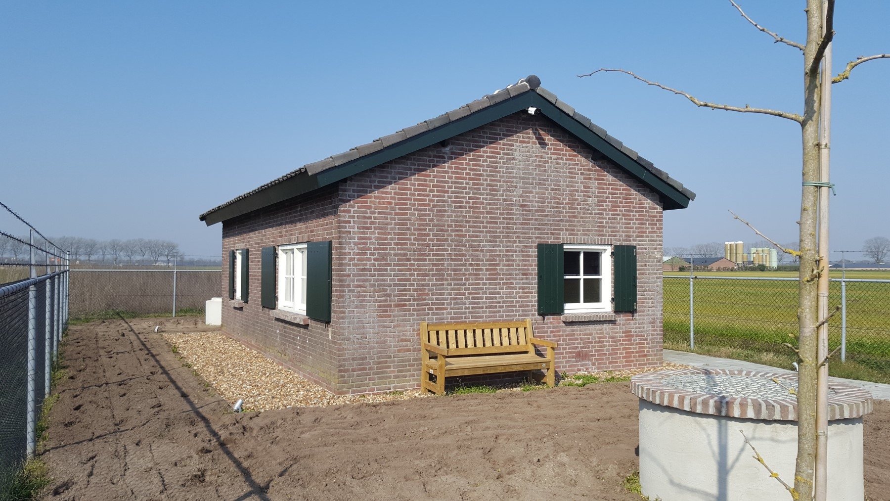 Het Wehrmachthuisje in Someren-Heide is gebouwd tijdens de Tweede Wereldoorlog. Het was een onderdeel van de Kammhuberlinie. Na de oorlog is het huisje tijdelijk als noodwoning gebruikt. Dit huisje is gerestaureerd in 2018/2019